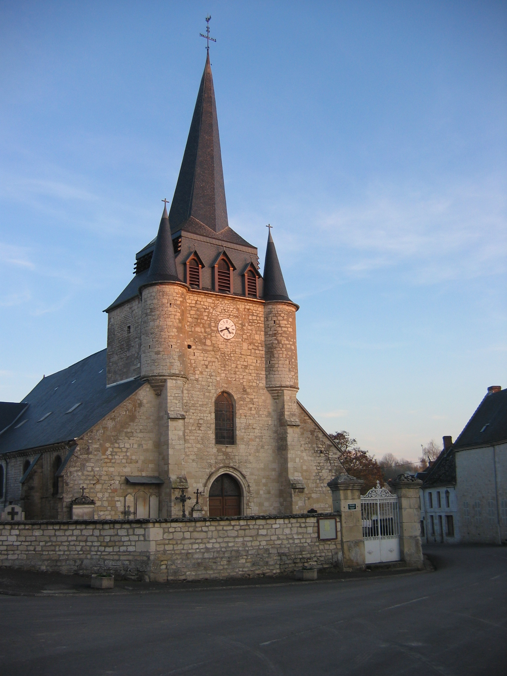 église de Sévigny-Waleppe Ardennes France